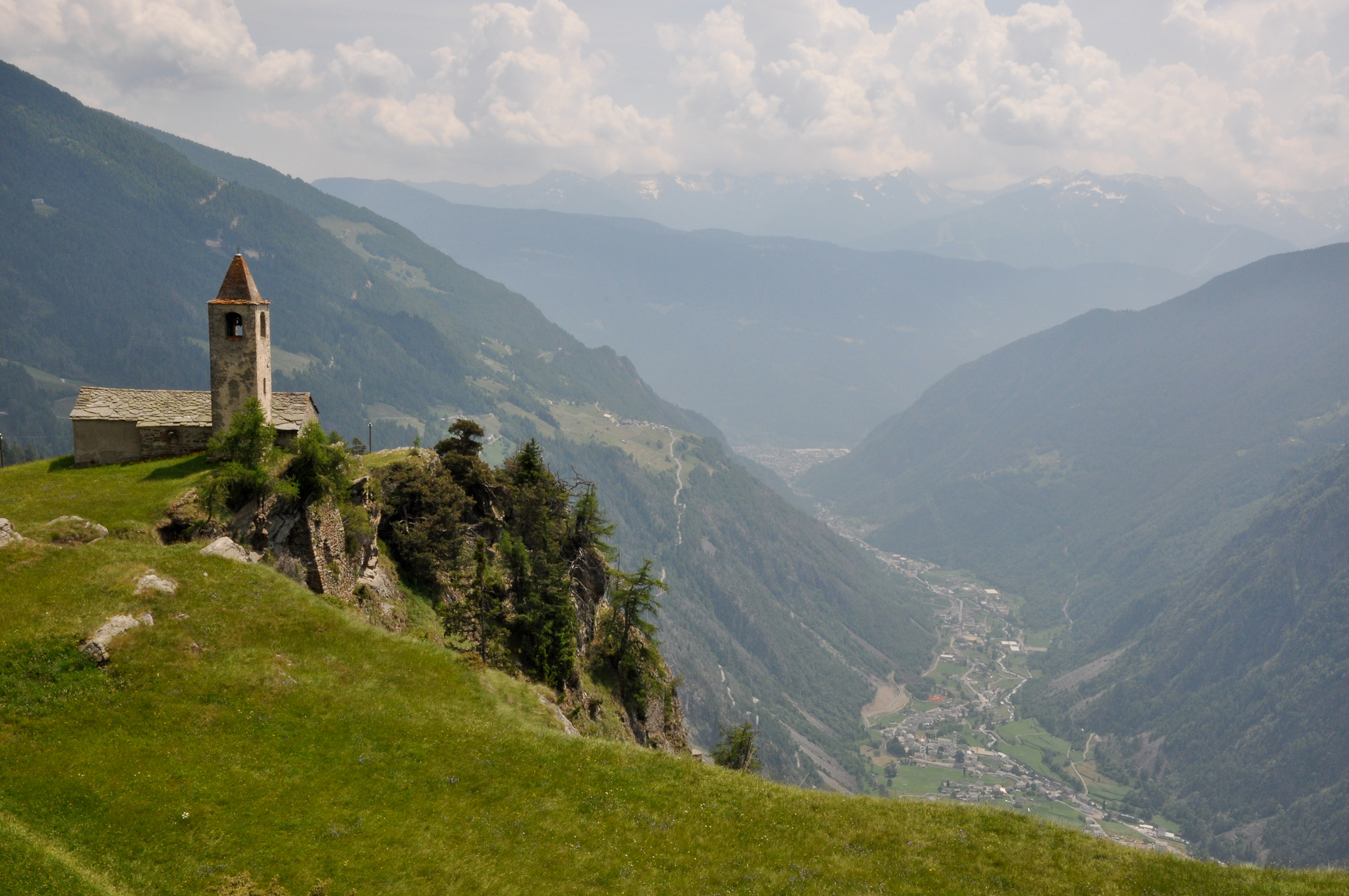 Kirche San Romerio, Brusio 1793m, Blick von Norden Richtung Tirano, Italien